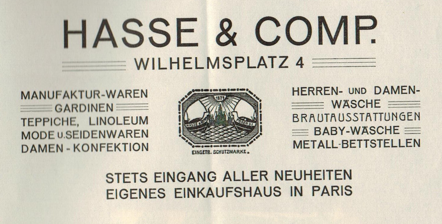 z zespołu Inspekcja Przemysłowa w Poznaniu